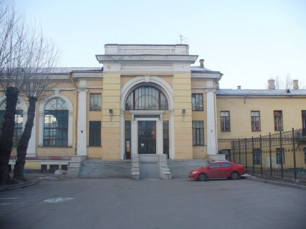 Бассейн Первой Санкт-Петербургской классической гимназии